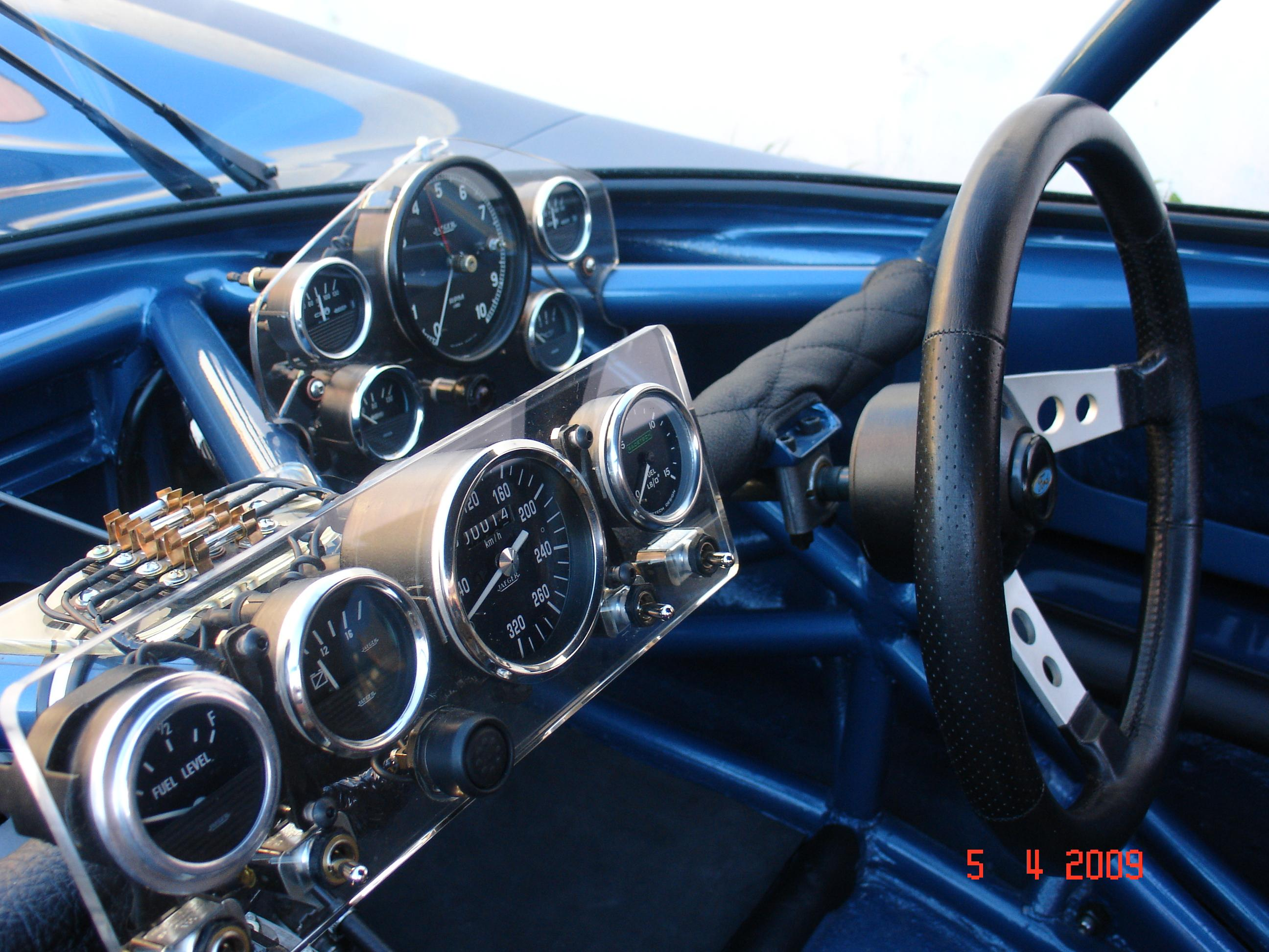 Table y volante del Huayra SP